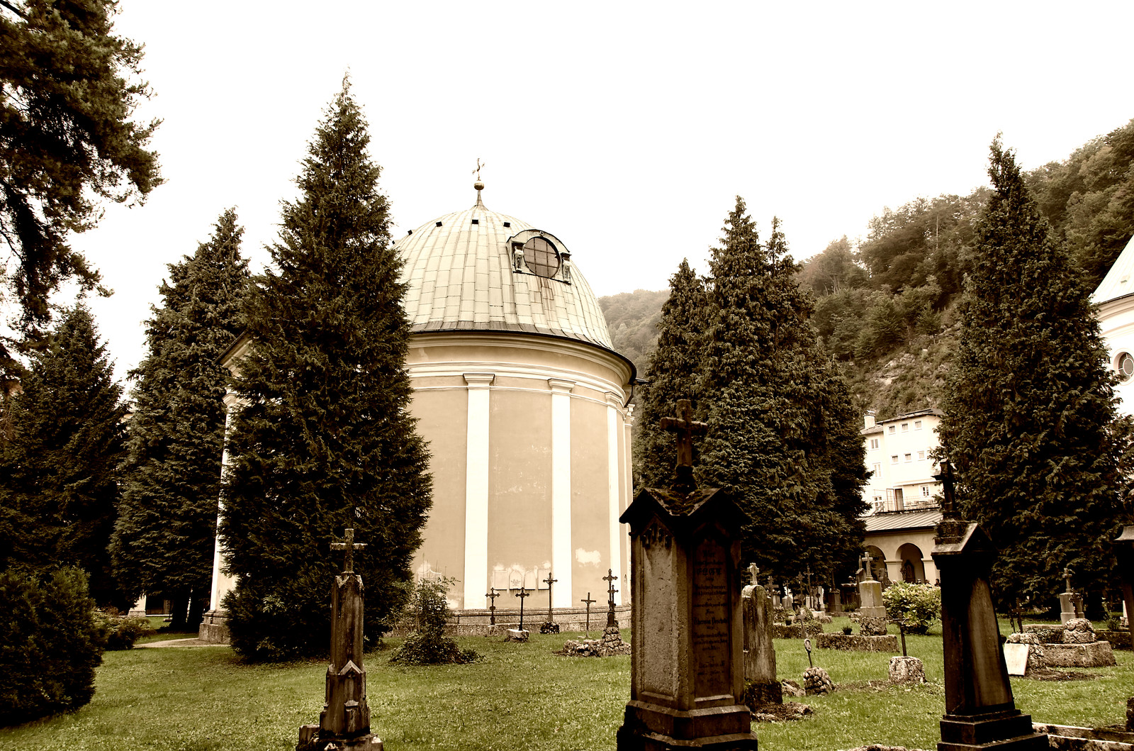 Sebastiansfriedhof mit Mausoleum des Wolf Dietrich von Raitenau Dieses Bild wurde anlässlich des österreichischen Tags des Denkmals 2012 in Salzburg eingereicht.